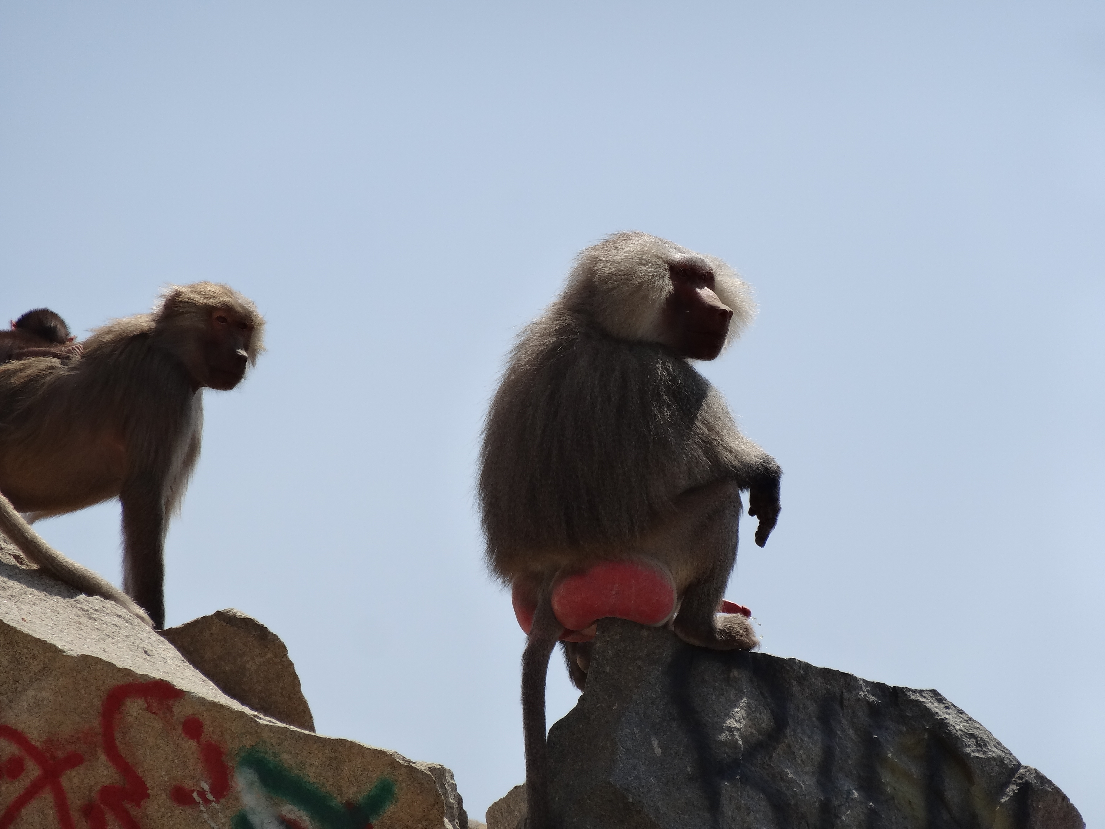 Hamadryas Baboons